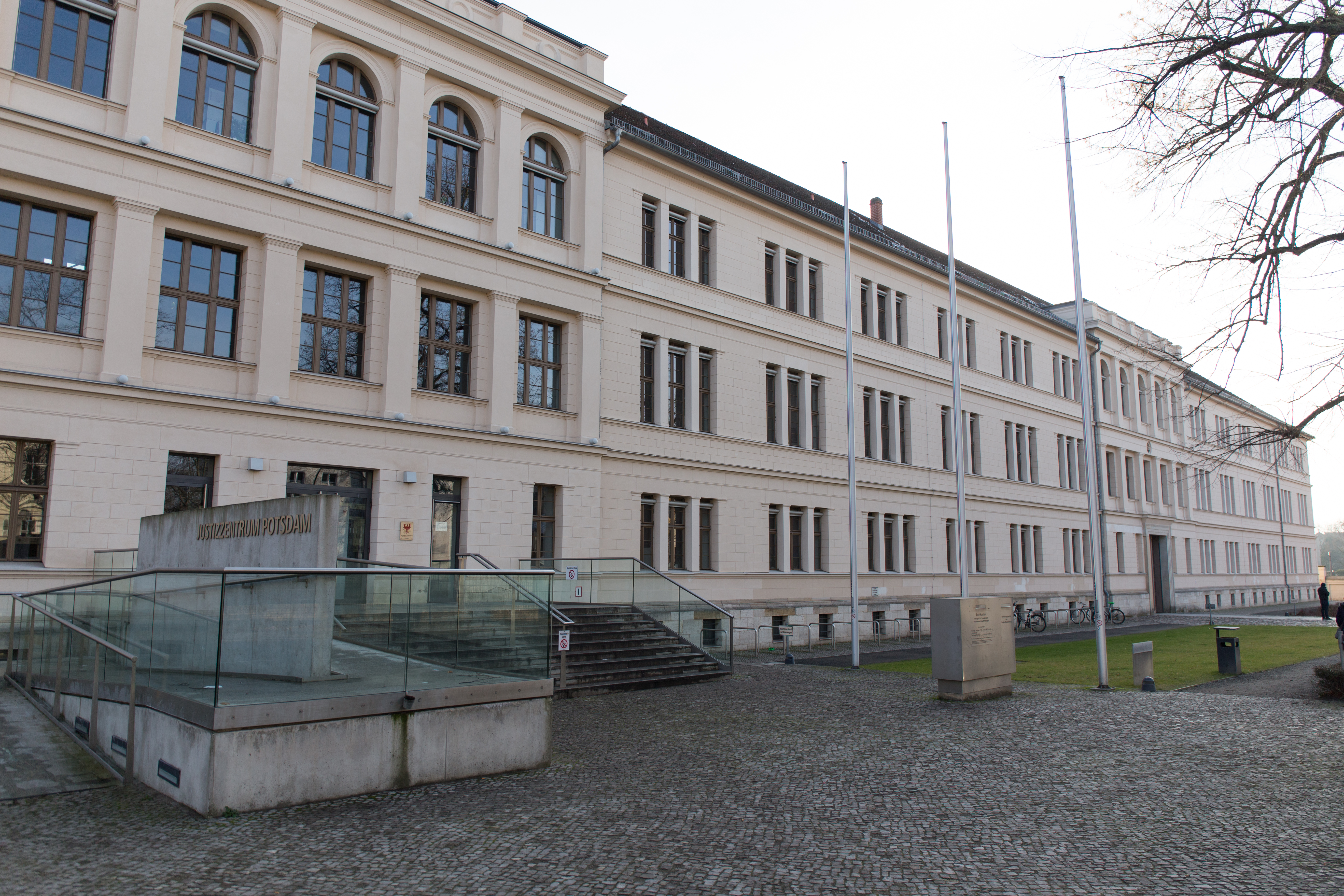 Führung durch Potsdam anläßlich von Hundert Jahre Frauenwahlrecht, Justizzentrum Potsdam in der Jägerallee 9-12